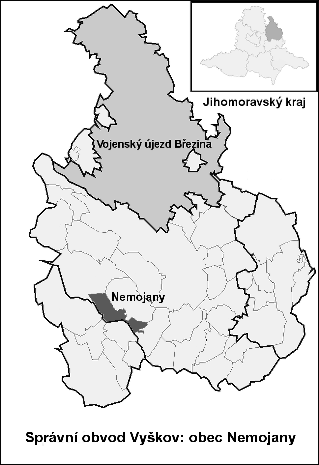 Hranice Nemojany (Vyškov- czech republic)